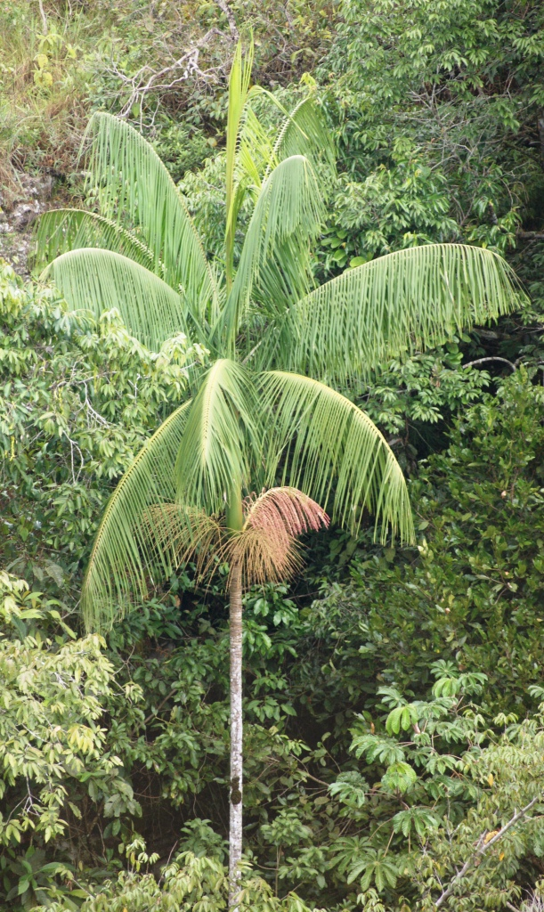 Euterpe edulis - ARECACEAEParque Estadual da Serra dos Pirineus - Pirenópolis - Goiás - Brasil.